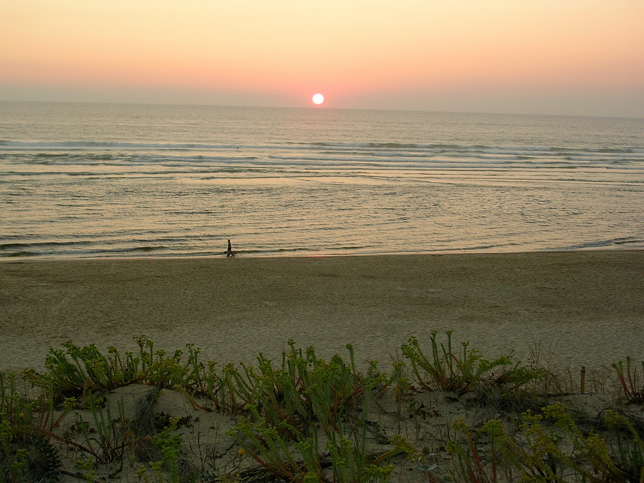 Vue plage sud à Mimizan, Landes. Photo prise par Jibi44